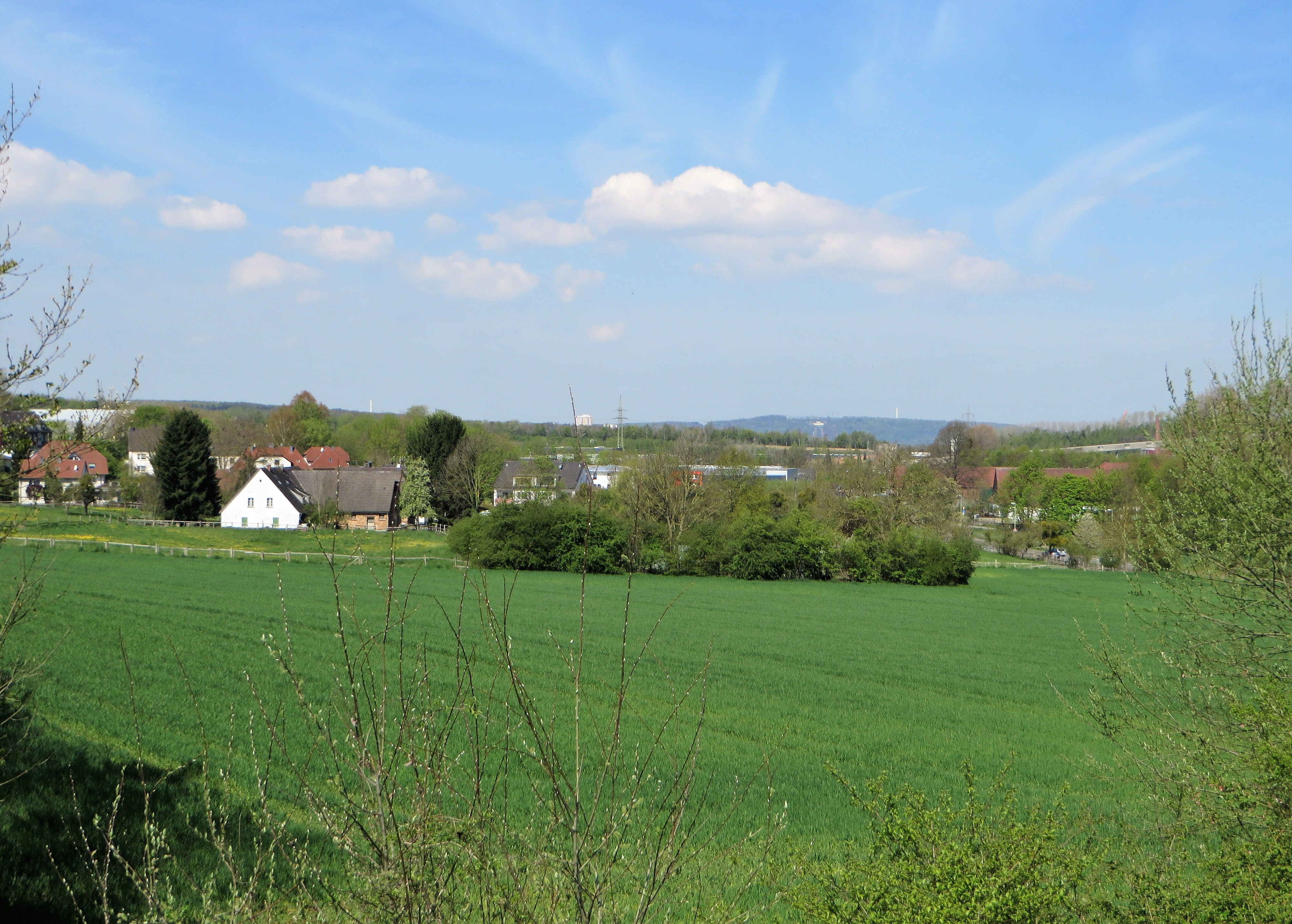 Landschaftsschutzgebiet „Herbeck“ in Hagen-Herbeck. Blick von der Autobahnbrücke (A 46) auf den Ortsteil Herbeck. Das Schutzgebiet mit z.T. bewaldeten Flächen, wird überwiegend landwirtschaftlich genutzt. Auf dem Foto rechts befindet sich das denkmalgeschützte Gut Herbeck. Am Horizont sieht man das Koepchenwerk am Hengsteysee.